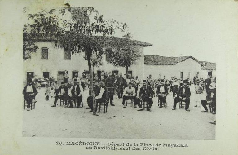 Площадът в Маядаг през Първата световна война